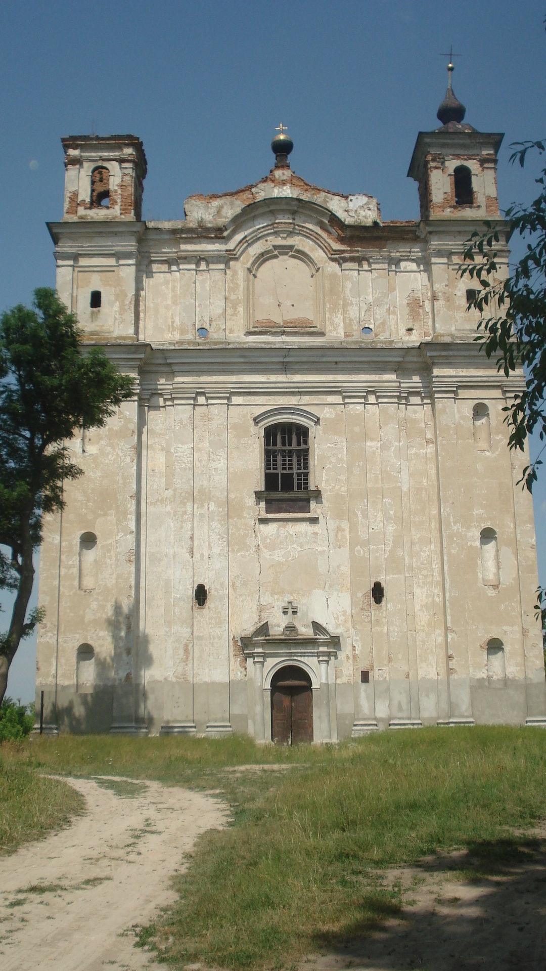 Костел св. Антонія у маєтку Стецьких